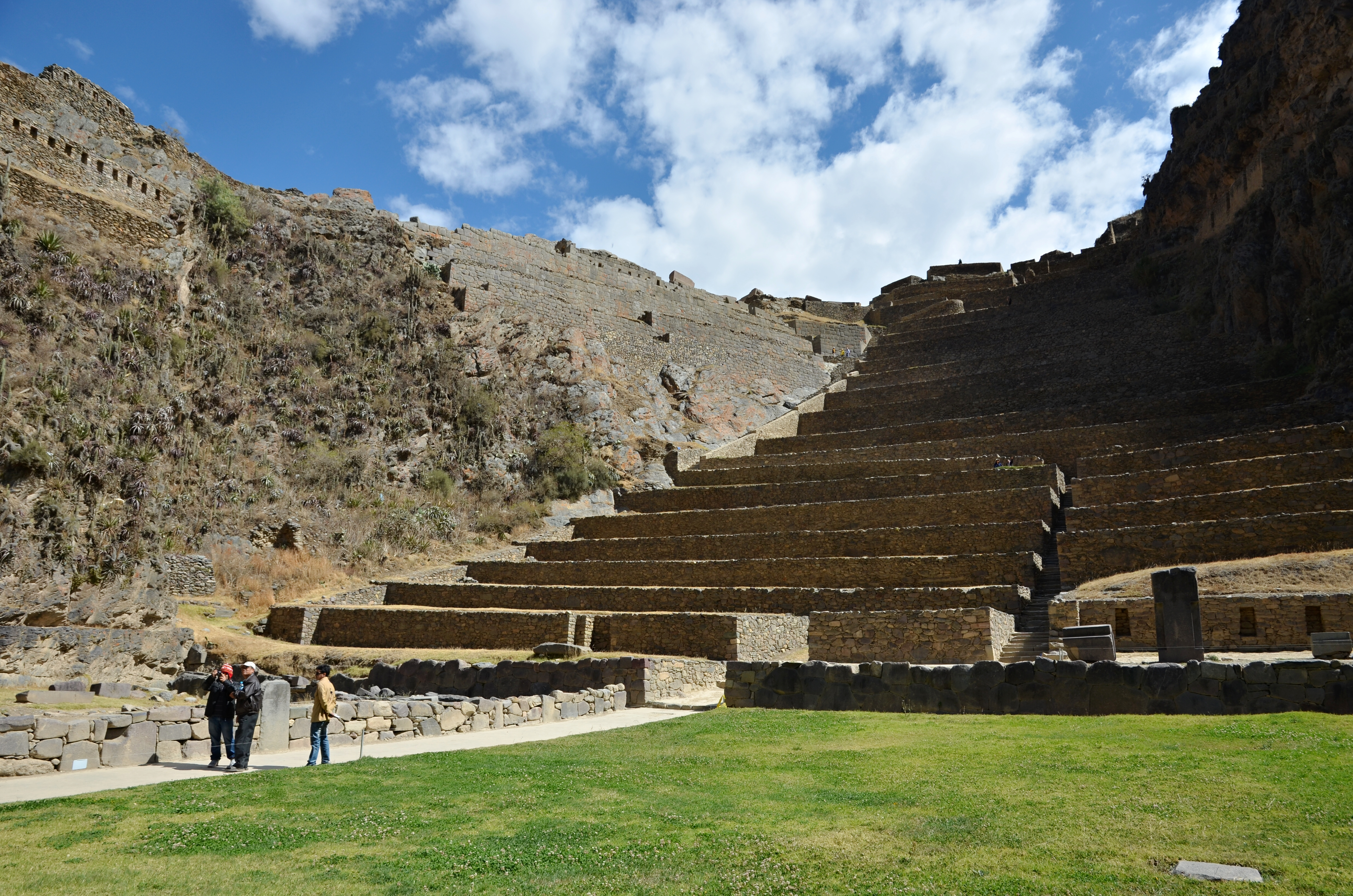 Ollantaytambo